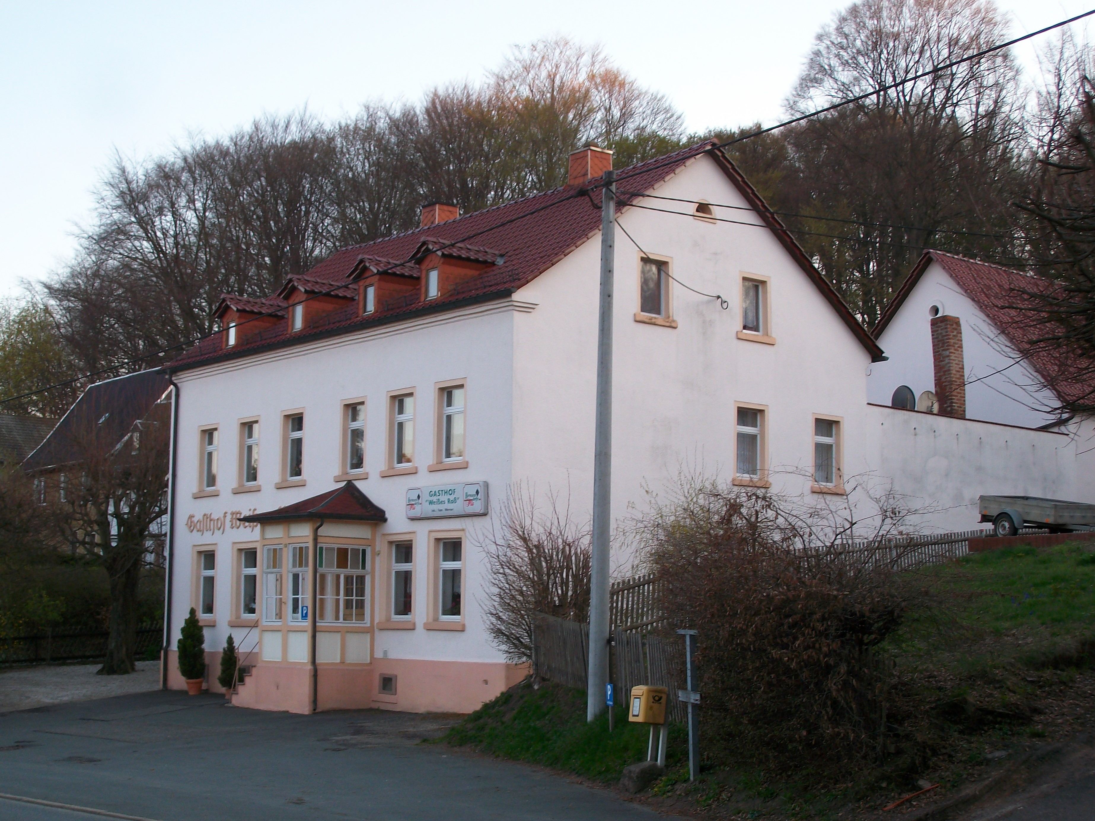 Eichlaide, Gasthof Weißes Roß